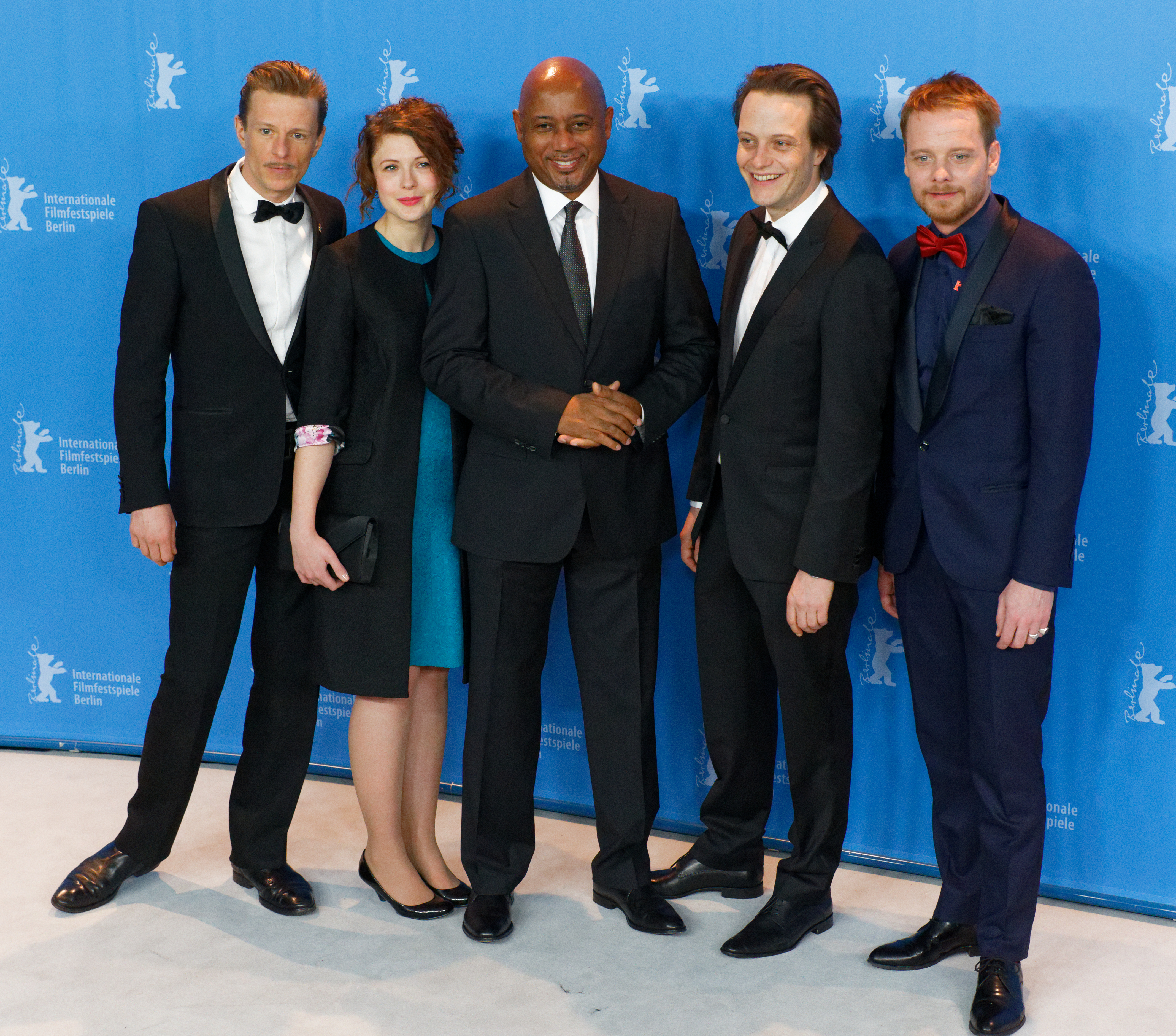 Raoul Peck & Cast beim Photo Call zu Der junge Karl Marx bei der Berlinale 2017: v.l.n.r. Alexander Scheer, Hannah Steele, Raoul Peck, August Diehl und Stefan Konarske